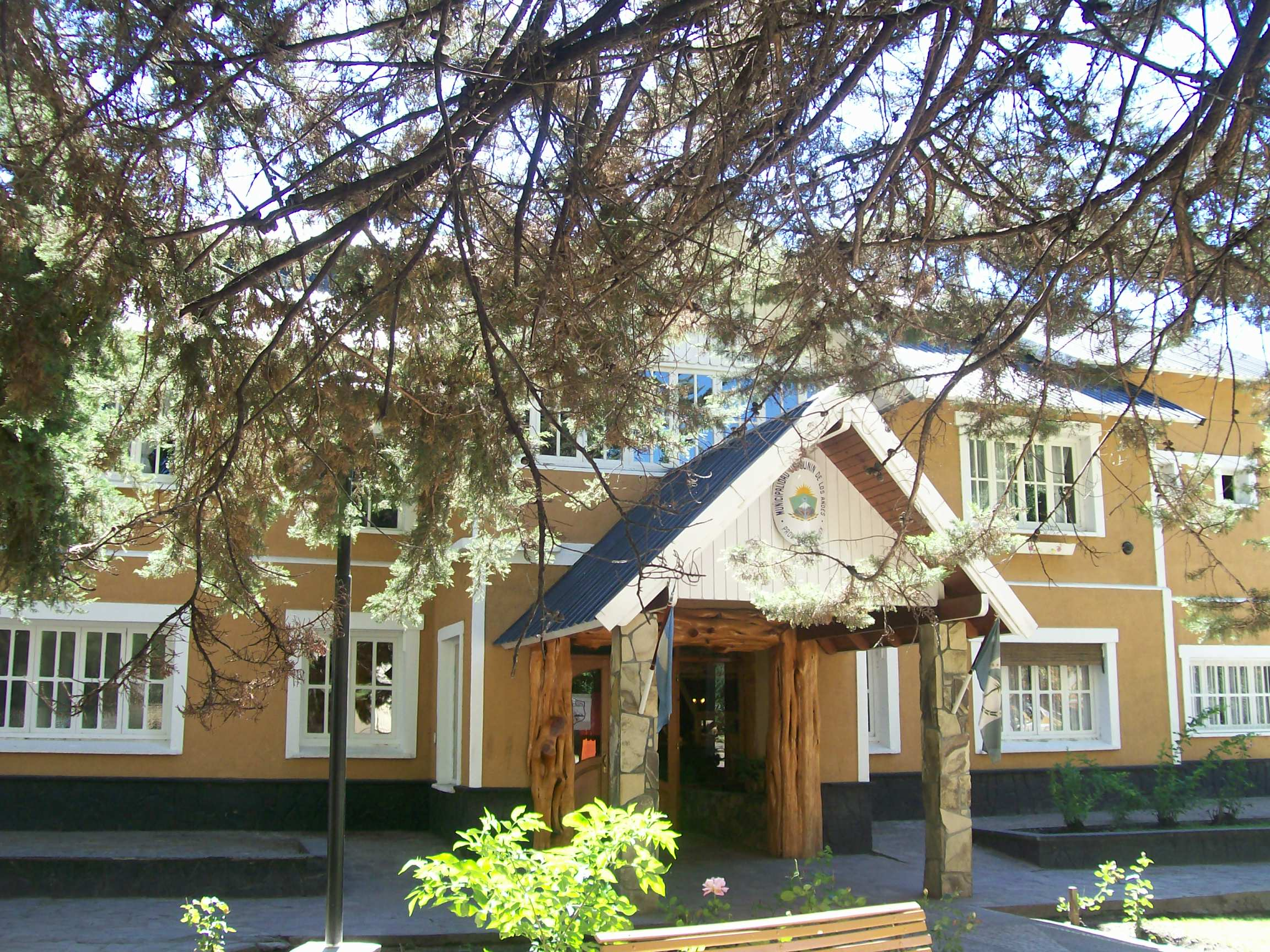 Municipalidad de Junin de los Andes.